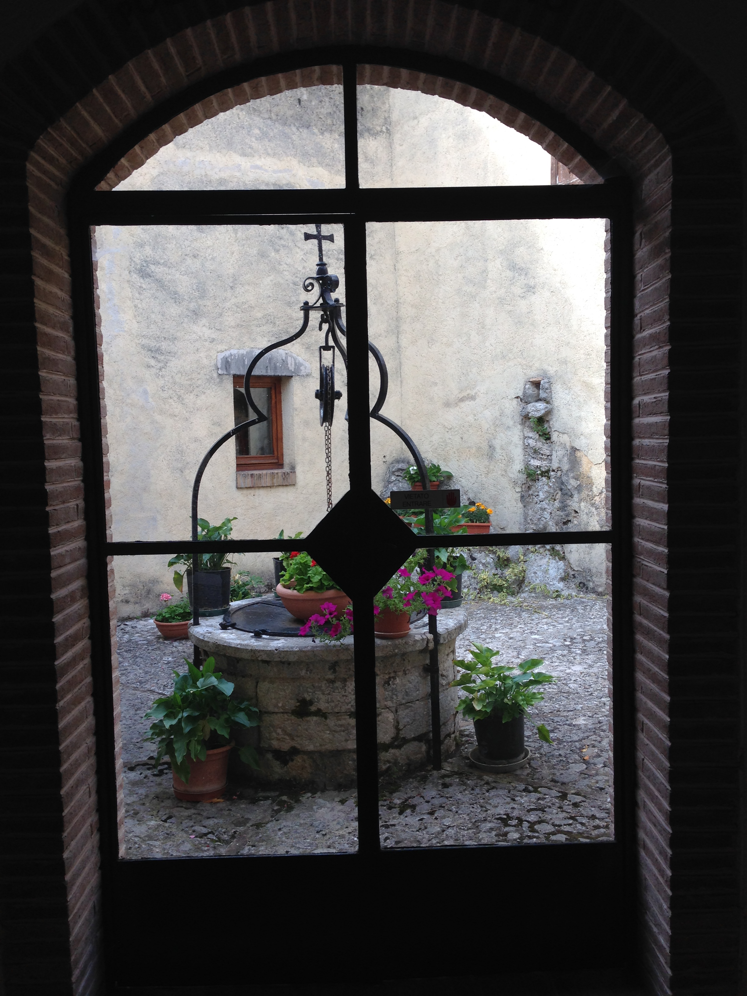 Pozzo di San Francesco. Eremo francescano. Monteluco